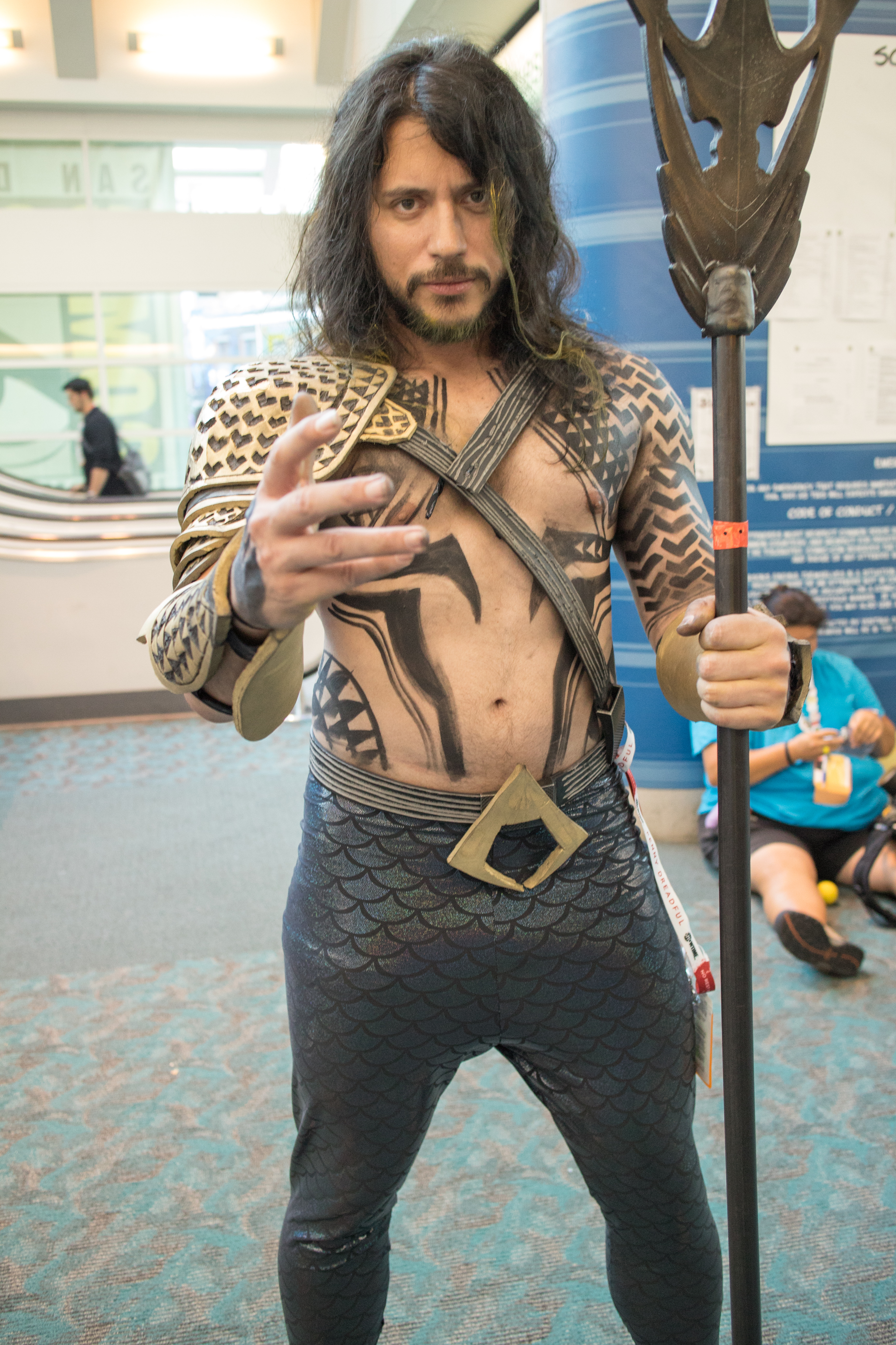 SDCC 2015-4945